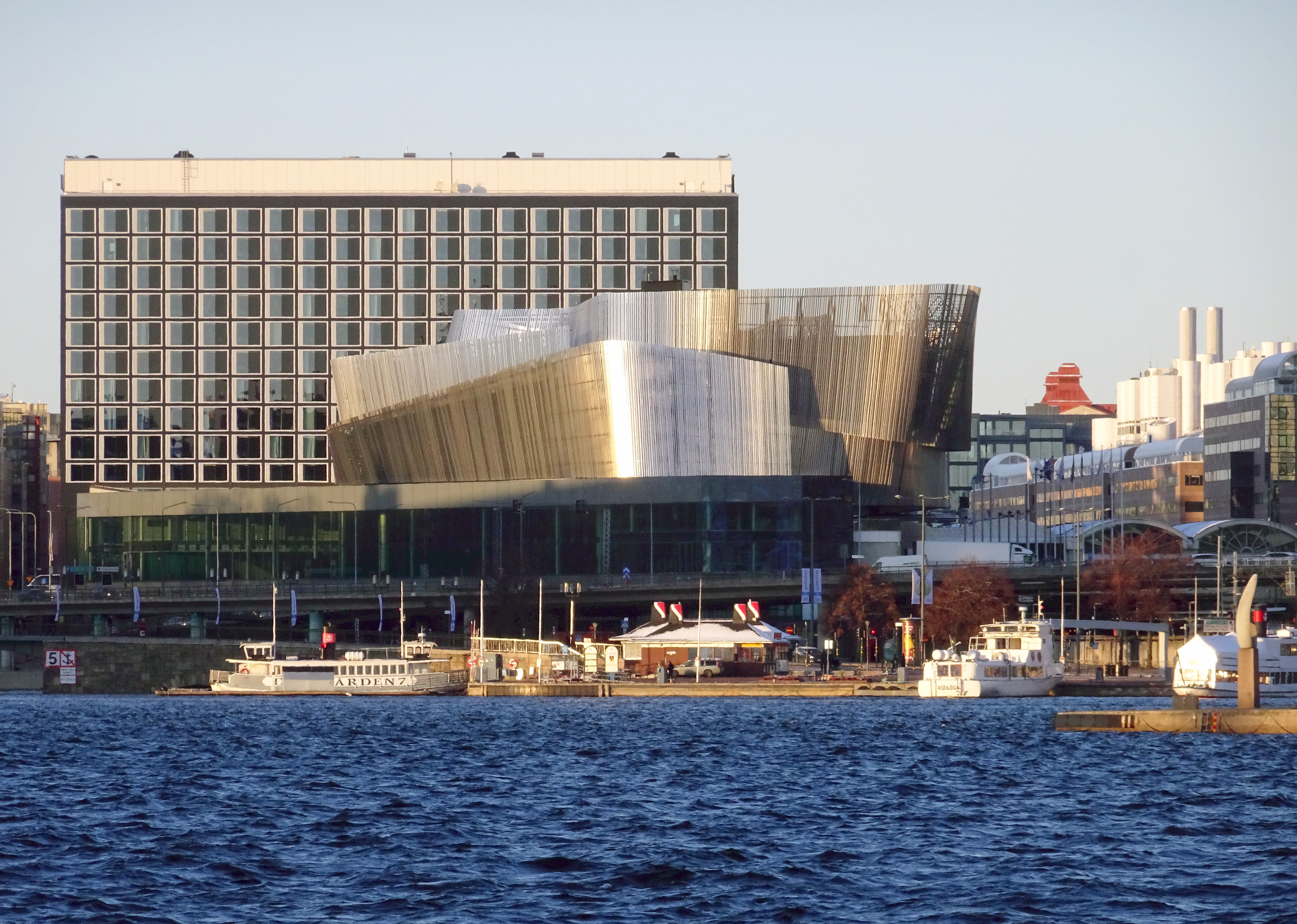 Waterfront Building, Stockholm, sedd från Söder Mälarstarnd